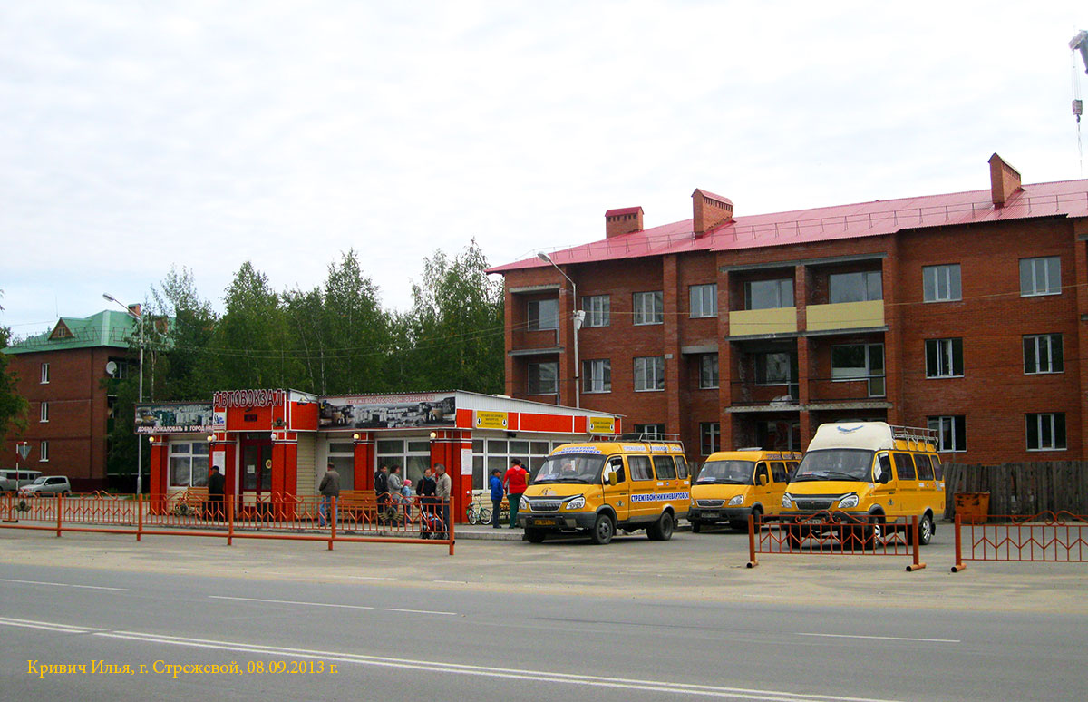 Автовокзал Стрежевой